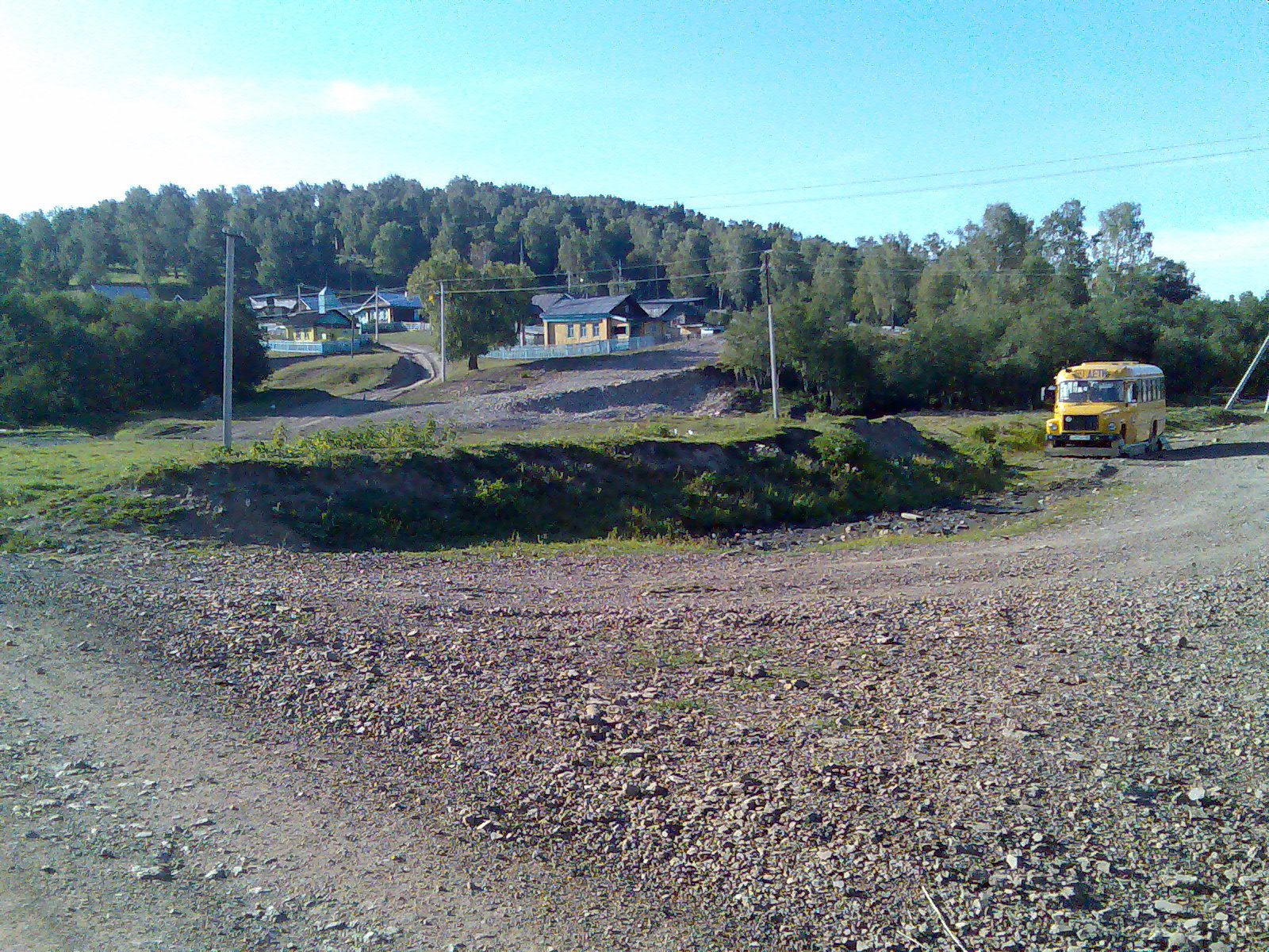 Новосаитово